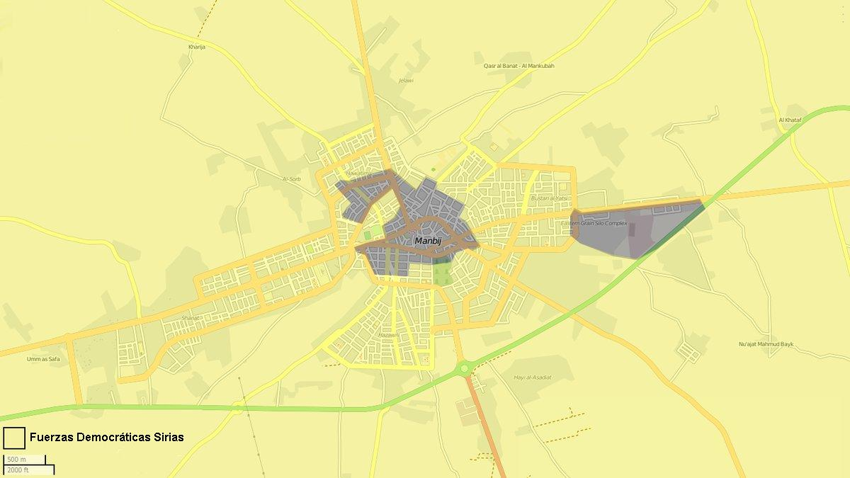 La ciudad de Manjib al 5 de agosto de 2016, siendo disputada por el Estado Islámico y las Fuerzas Democráticas Sirias.